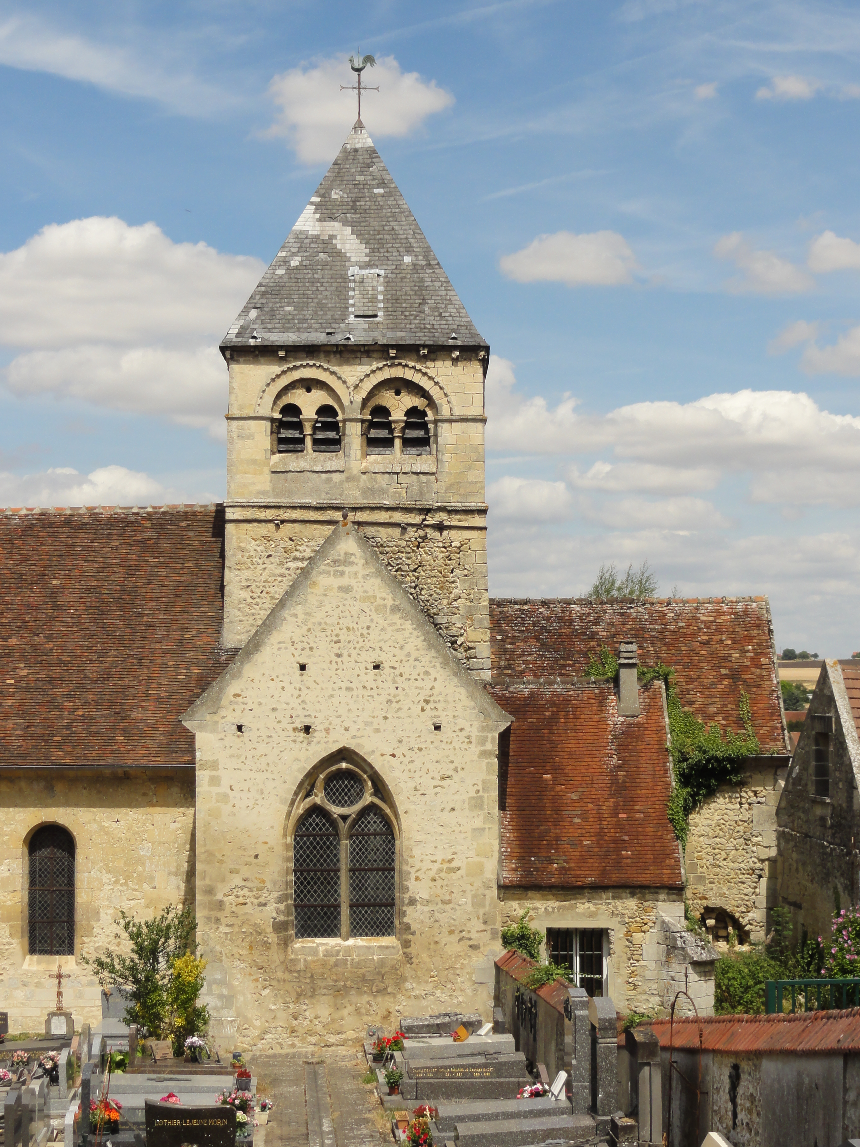 Église Saint-Michel-et-Saint-Vaast de Catenoy (voir titre).